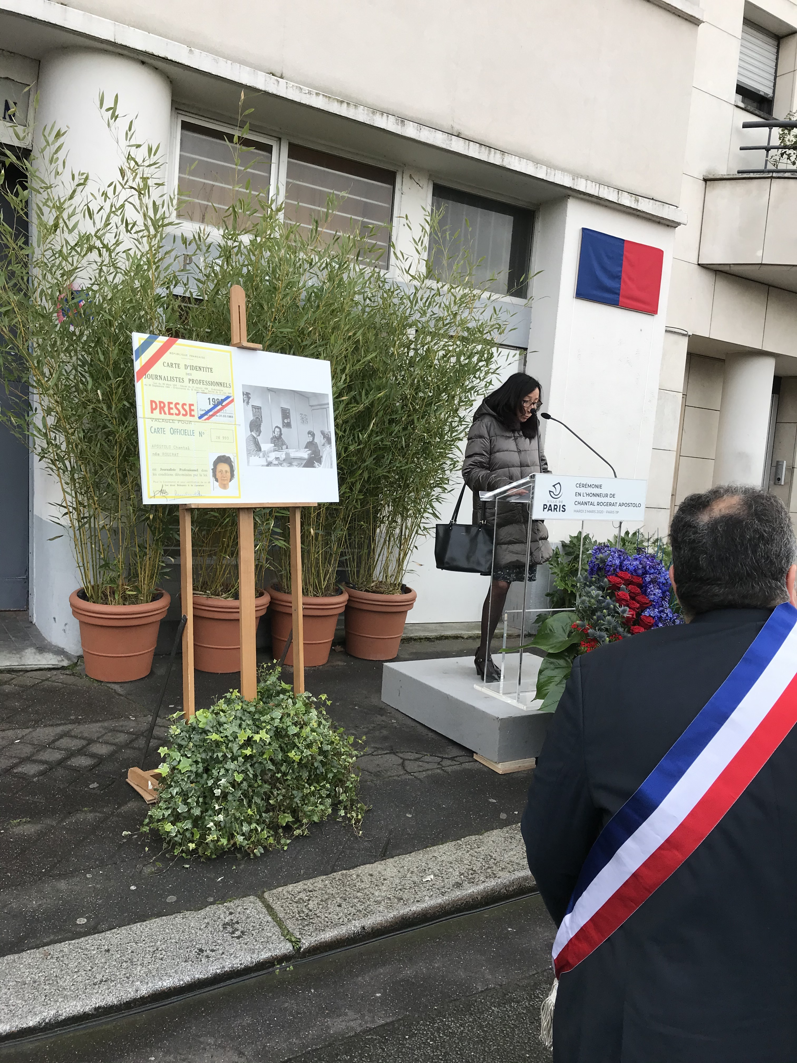 Cérémonie d'inauguration de la plaque commémorative en l'honneur de Chantal Rogerat